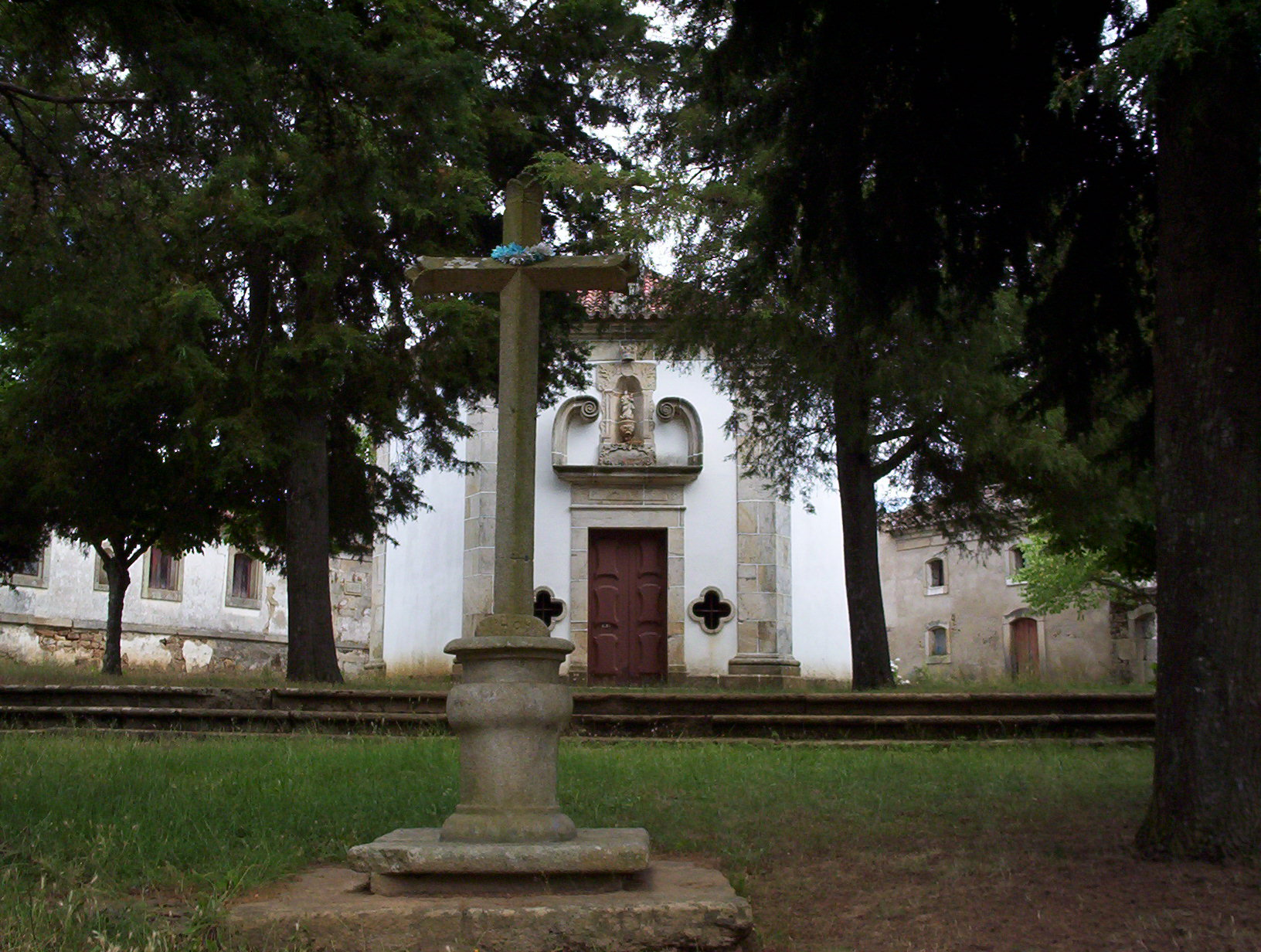 Ermida Senhora das Fontes, Santa Eufêmia, Pinhel